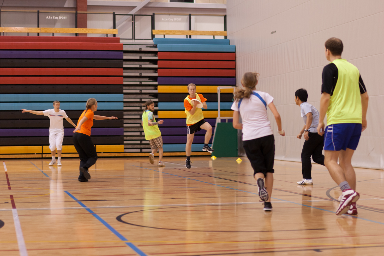 Tartu frisbeeklubi. A. le Coqi spordihoone Tartus.